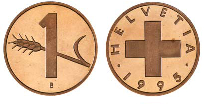 1 Ct 1995, image originale de SwissMint